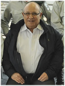 January 10, 2011 Today, the IDF Chief of Staff, Lt. Gen. Gabi Ashkenazi, as well as members of the General Staff, parted with the outgoing Director of the Mossad Intelligence Agency, Maj. Gen (res.) Meir Dagan in a celebratory lunch at the Rabin base in Tel Aviv. The Chief of Staff thanked the outgoing Mossad Director for his combined effort and said, "During the past eight years, as head of the Mossad, you were on the forefront of achievement. You led the agency during a unique and challenging period and contributed exceptionally, with most of your achievements unknown. Over the eight years we've worked together collaboratively and with the mutual understanding that we are working towards a shared and higher goal--the security of the State of Israel." The outgoing Director thanked the Chief of Staff for the years of cooperation and wished him and the General Staff luck in the rest of their endeavors. Pictured: The General Staff with Maj. Gen. (res.) Meir Dagan Photography: Cpl. Ori Shifrin, IDF Spokesperson's Unit * הרמטכ"ל, רא"ל אשכנזי, וחברי פורום המטה הכללי נפרדו היום (ב') מראש המוסד היוצא, אלוף (במיל') מאיר דגן, בארוחת צהריים חגיגית בבסיס רבין בת"א. הרמטכ"ל הודה לראש המוסד היוצא על העבודה המשותפת ואמר כי "בשמונה השנים האחרונות, כראש המוסד, היית בחזית העשייה, הובלת את הארגון בתקופה מיוחדת ומאתגרת ותרמת תרומה ייחודית שרובה לא ידועה. בשנים האחרונות עבדנו יחד בשיתוף פעולה ומתוך הבנה שאנחנו משרתים מטרה משותפת ועליונה- ביטחונה של מדינת ישראל". ראש המוסד היוצא הודה לרמטכ"ל על שיתוף הפעולה ואיחל לו ולחברי פורום מטכ"ל הצלחה בהמשך העשייה החשובה. בתמונה: פורום מטכ"ל והאלוף (מיל') דגן. צילום: רב"ט אורי שיפרין, דובר צה"ל